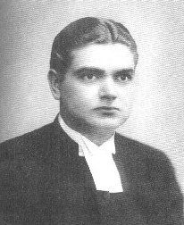 Sztehlo Gábor (1909 – 1974) evangélikus lelkész. Kétezer ember megmentője, a Gaudiopolis - Örömváros megálmodója, létrehozója.